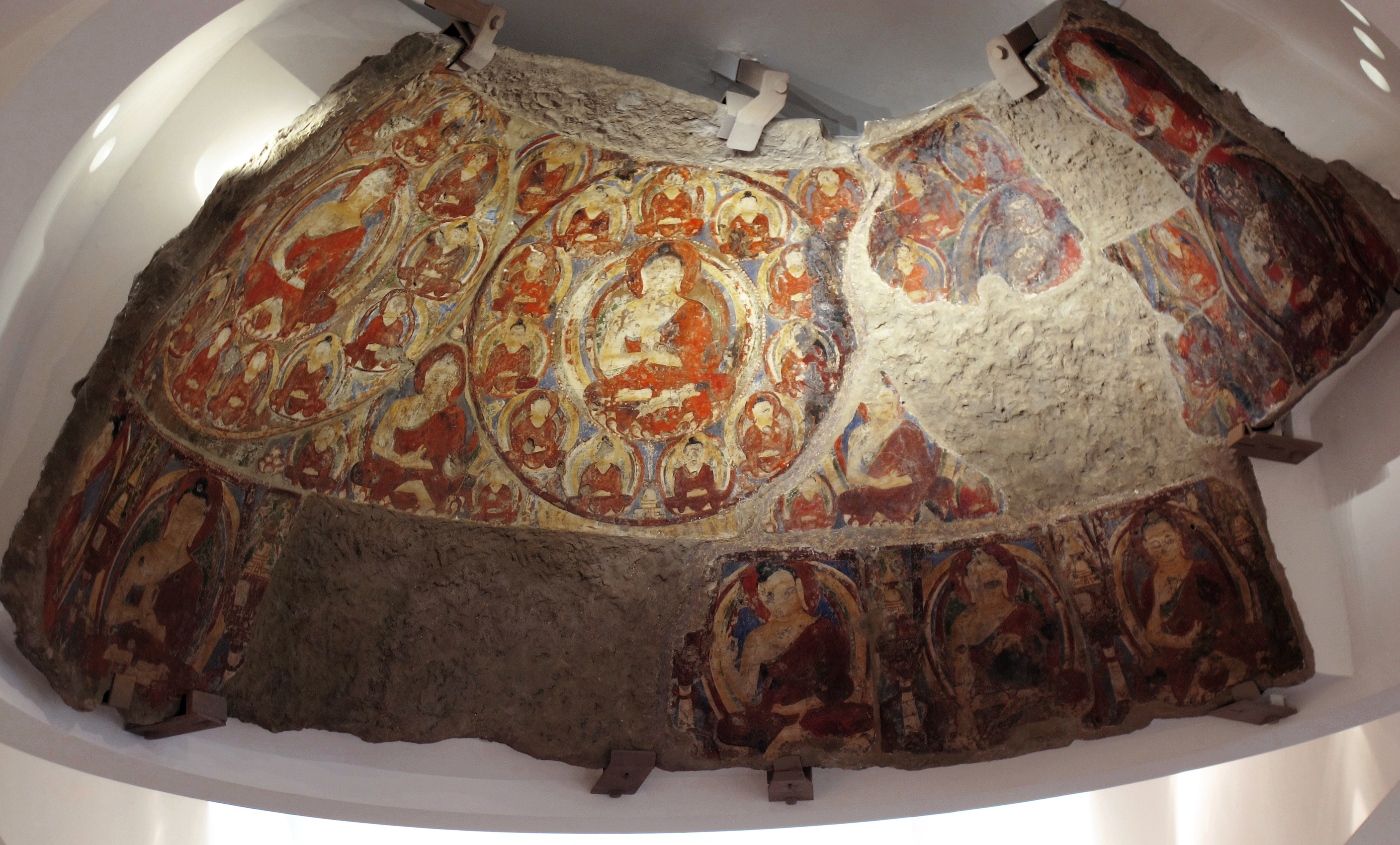 Fragment de coupole. Peinture murale, pigments minéraux sur torchis. H. 100 cm, D. 300 cm. Kakrak. Site secondaire près de la falaise de Bamiyan. VIe siècle. Musée national des arts asiatiques - Guimet, Paris. Les grands médaillons aux nombreux bouddha évoquent les mandala du bouddhisme ésotérique. Ref. :Gilles Béguin, L'Inde et le monde indianisé au musée national des arts asiatiques - Guimet. Réunion des musées nationaux, 1992.